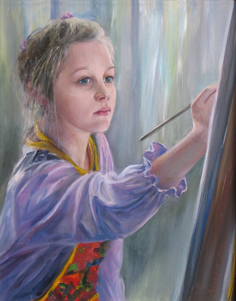 Юная художница